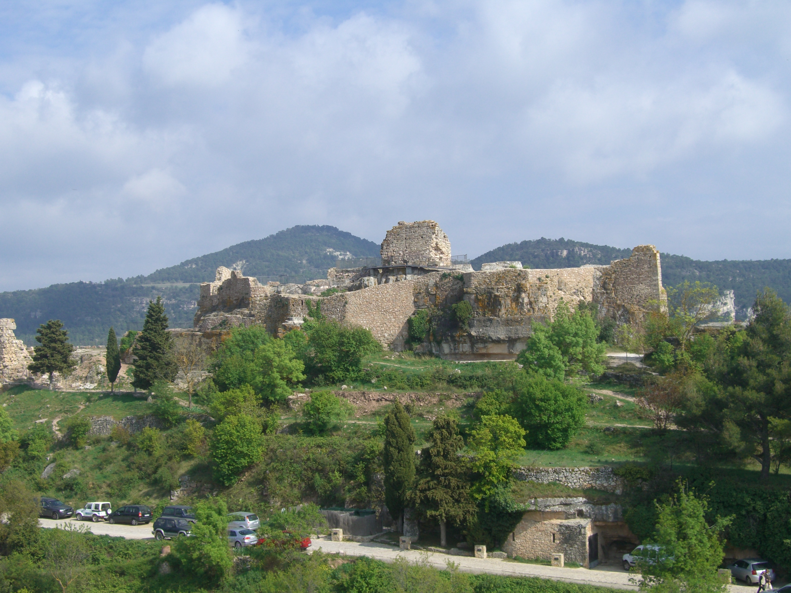 Castell de Siurana (Cornudella de Montsant, Priorat, Catalunya)